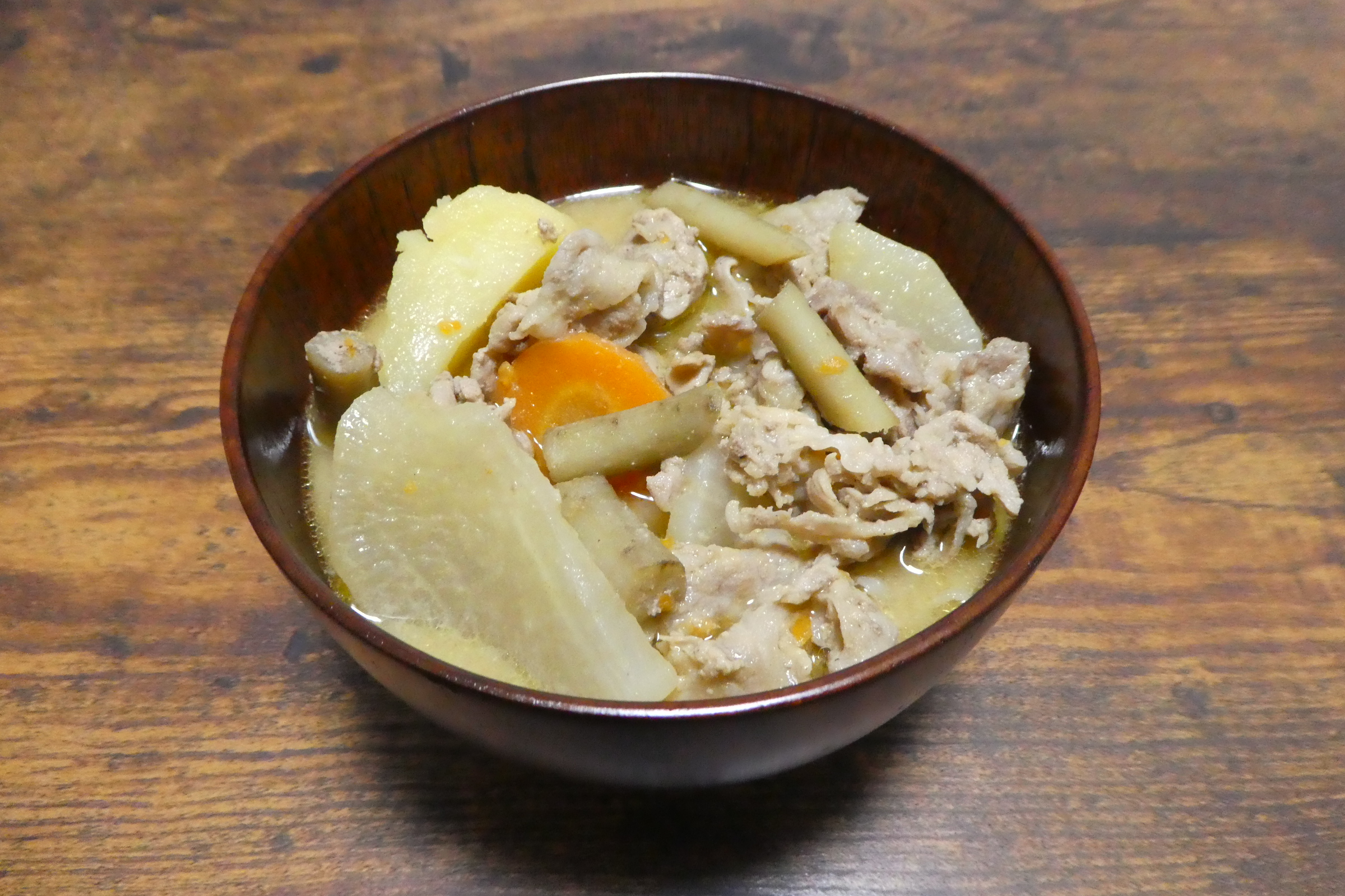 自家製の豚汁。具材は、大根、人参、ゴボウ、豚肉、ジャガイモ（メークイン）、味噌。切干大根による調理。